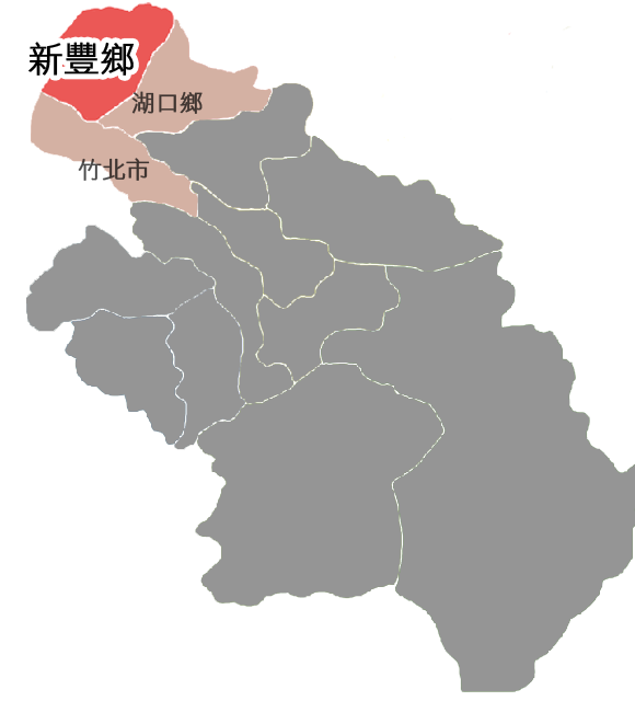 新豐鄉相對位置。